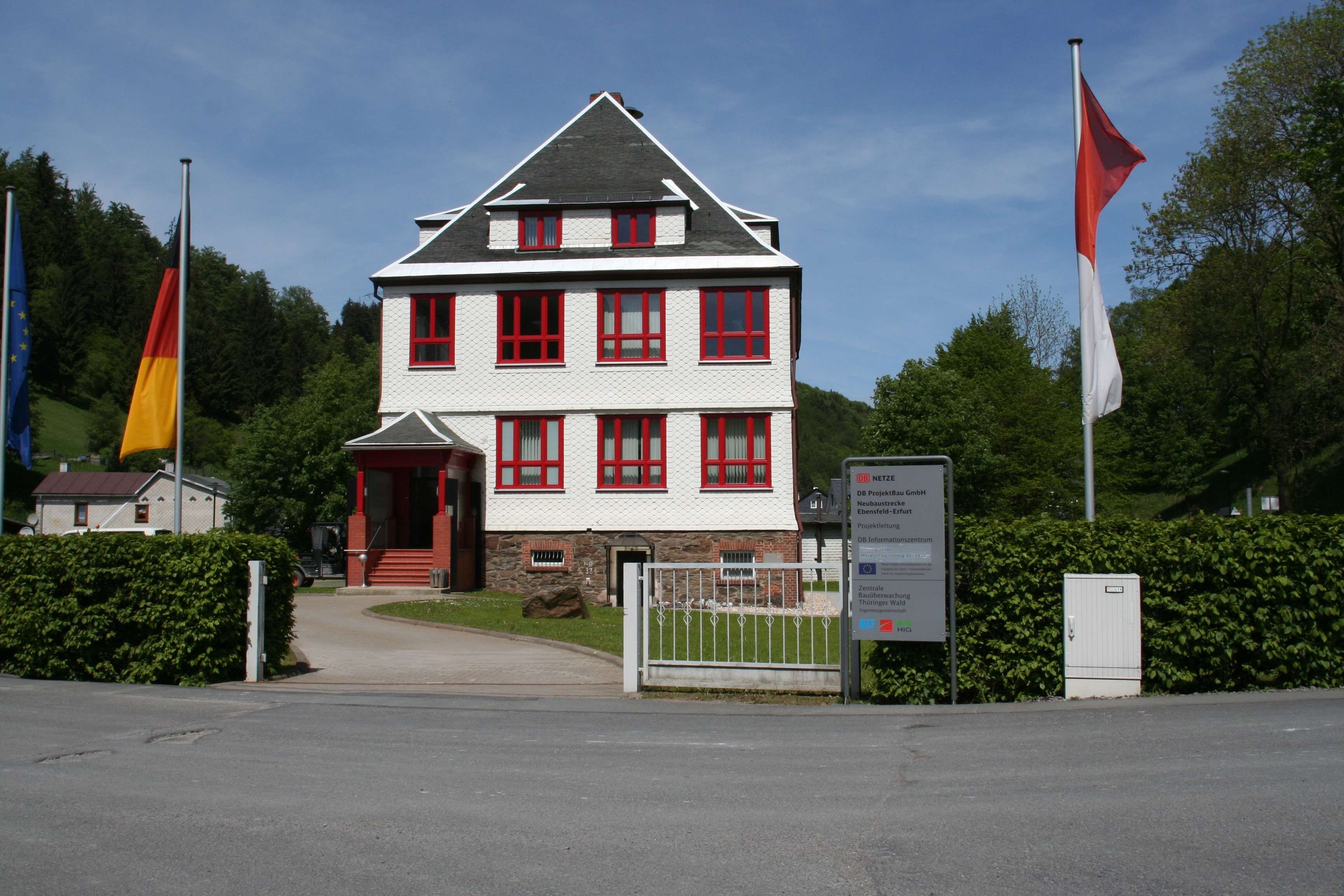 Informationszentrum der DB zur Neubaustrecke Ebensfeld–Erfurt, Goldisthal, Thüringen